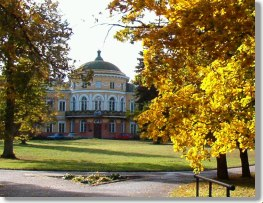 Vytautas Ribikauskas, Baisogala, Lithuania. Central building of LIAS, Baisogala, Lithuania. (Appears in